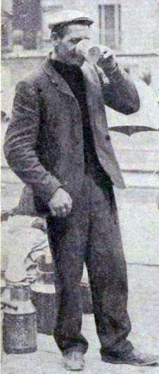 Auguste Daumain buvant du lait, lors du Tour de France 1904 (classé 6e, et médaillé de bronze sur 25 kilomètres lors des Jeux olympiques de Paris en 1900).